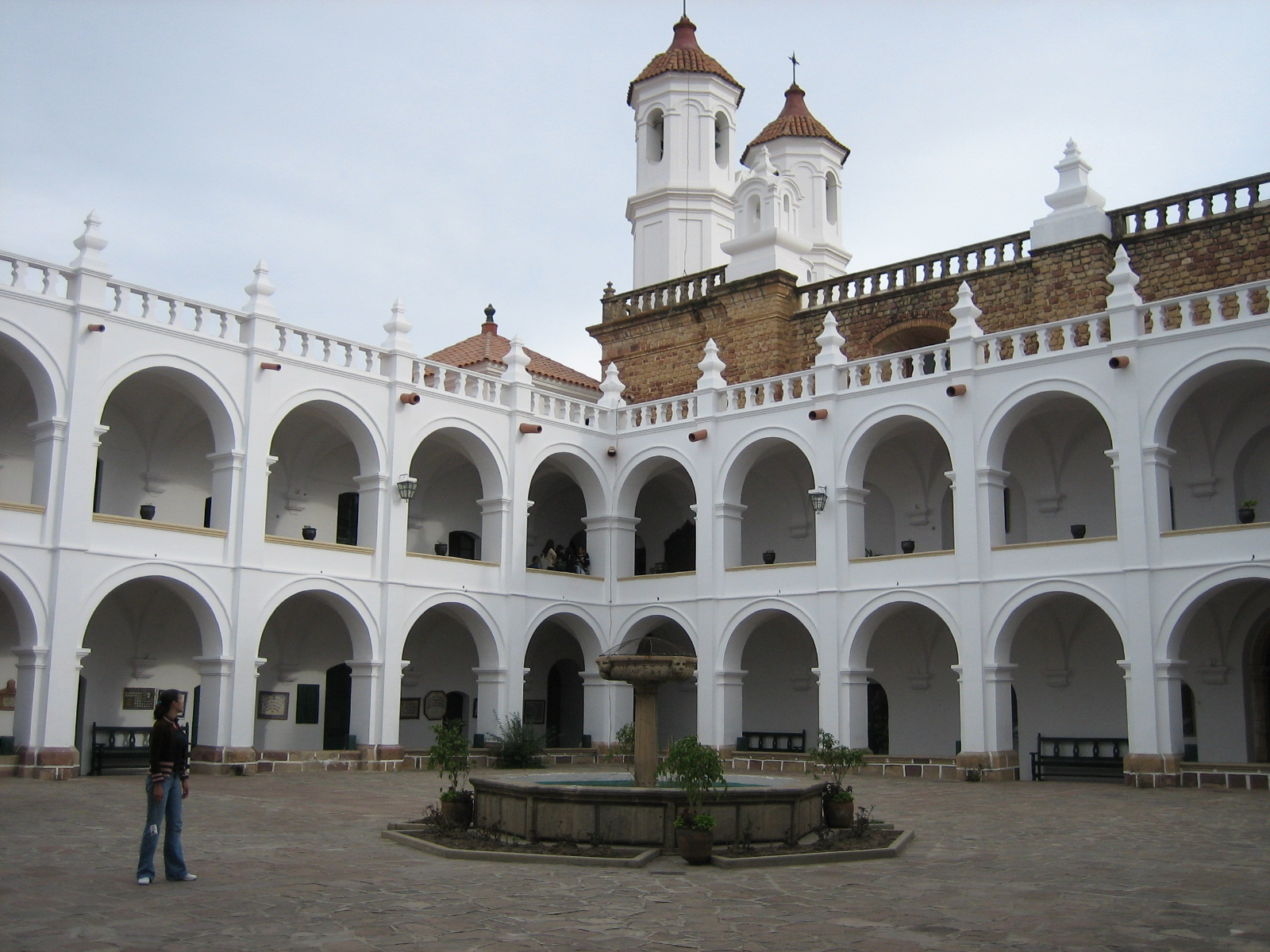 Iglesia San Felipe Neri, patio del convento